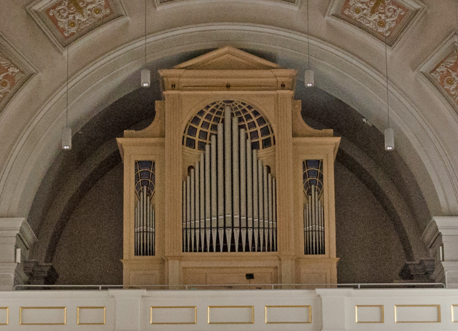 Ansbach, kath. Kirche St. Ludwig am Karlsplatz